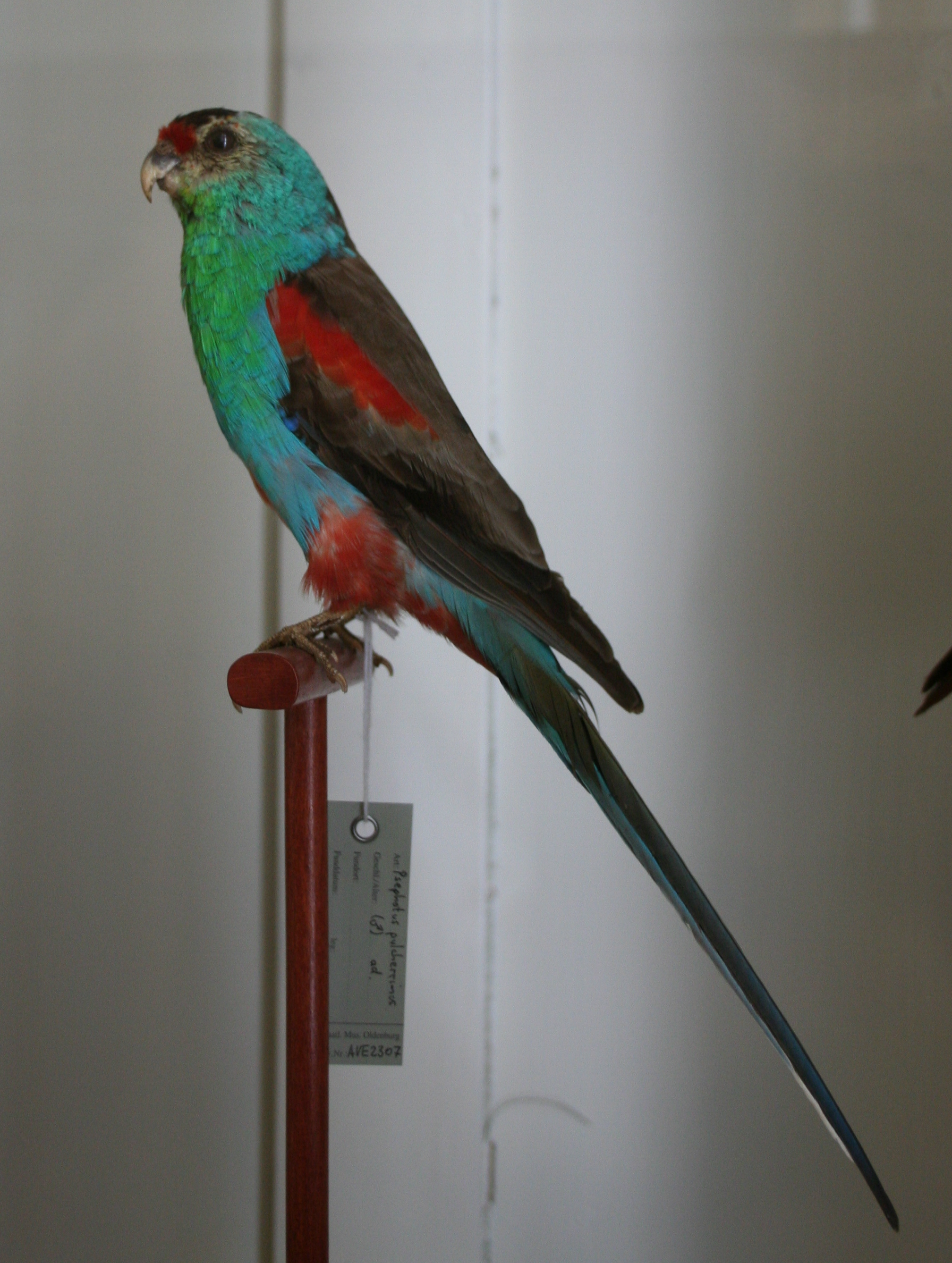 Landesmuseum für Natur und Mensch, Oldenburg